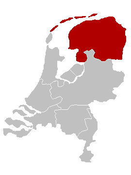 locatie van het bisdom Groningen-Leeuwarden, eigen werk